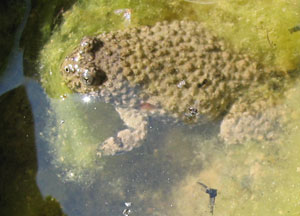 Bombina pachypus